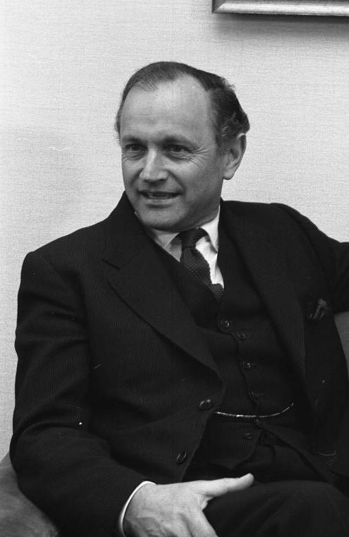 Staatssekretär Carstens empfängt den brit. Staatsminister Lord Chalfont im Auswärtigen Amt Bonn Information added by Wikimedia users.Alun Jones, Baron Chalfont (probably; doesn't look like Karl Carstens), at a visit to Germany